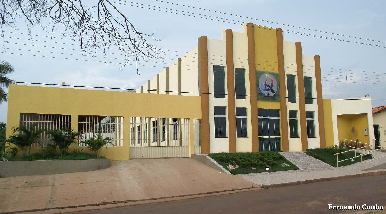 Igreja Assembléia de Deus do povoado Lagoa Verde, município de Imperatriz Maranhão.